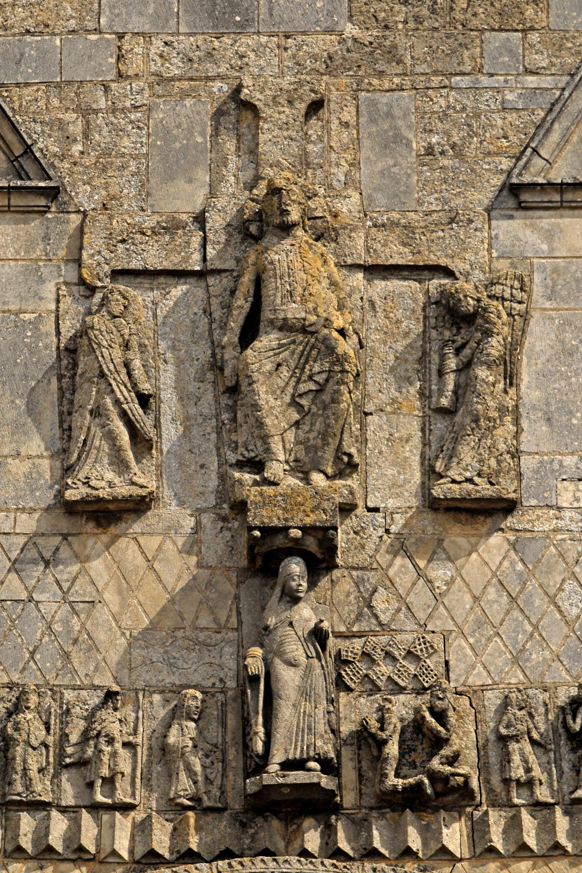 Saint-Jouin-de-Marnes, Erscheinung Christi am Jüngsten Tag